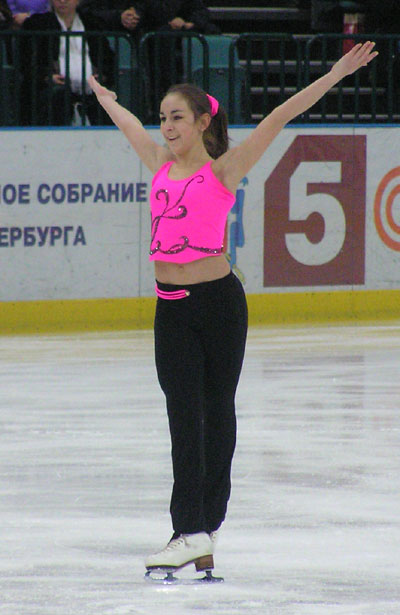 Lilia Biktagirova (Russische Meisterschaften 2005)